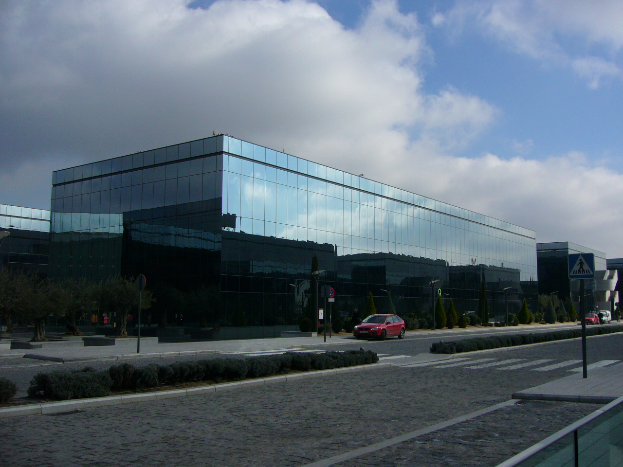 Edificio en el Parque empresarial de La Finca en Pozuelo de Alarcón, Madrid, España Building of the Business Park of La Finca in Pozuelo de Alarcón, Madrid, Spain